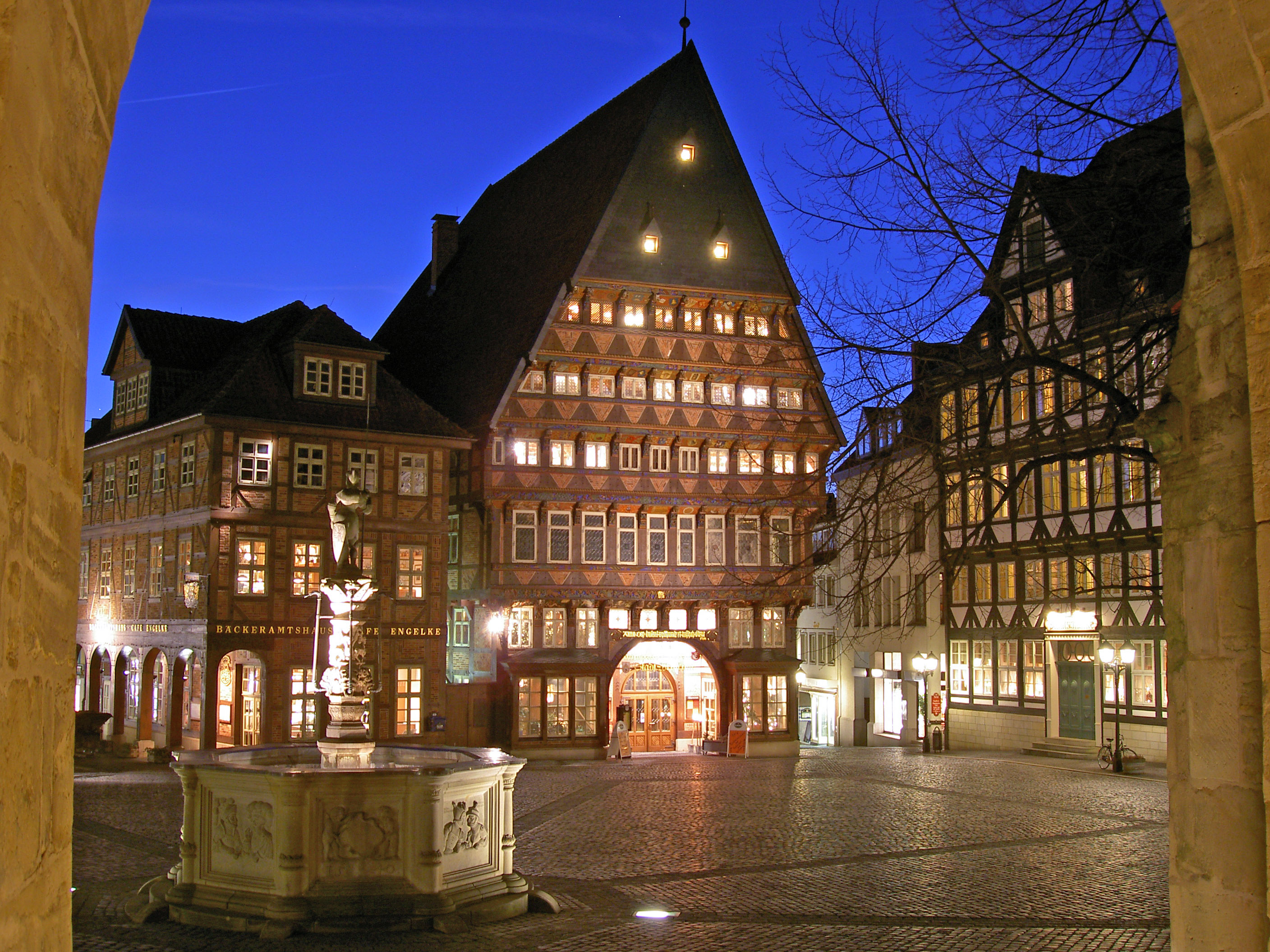 Blick auf den Marktplatz zu Hildesheim. Links das Bäckeramtshaus, mittig das Knochenhaueramtshaus, rechts die Stadtschänke. Im Vordergrund ist der Rolandsbrunnen zu sehen. Die rechts und links im Bildvordergrund zu sehenden Mauern gehören zu einem der Bögen des Rathauses.